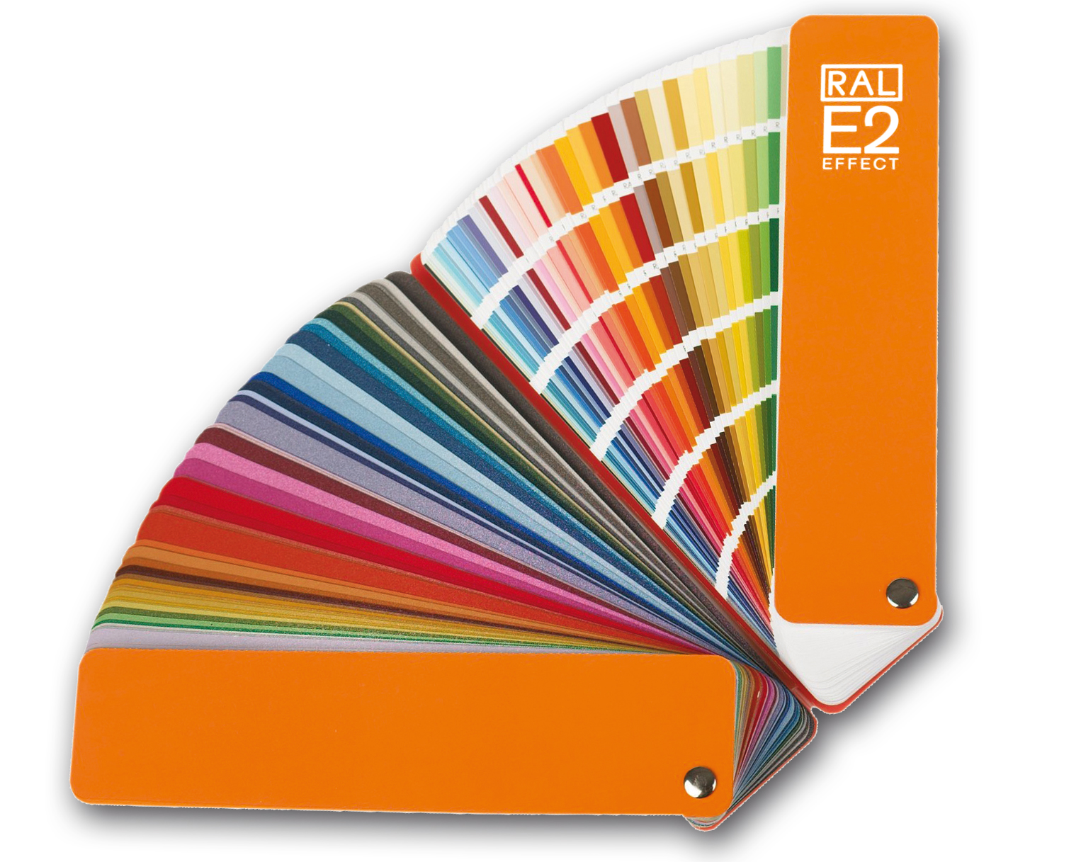 RAL EFFECT enthält 420 Uni-Farben und 70 Metallic-Farben.